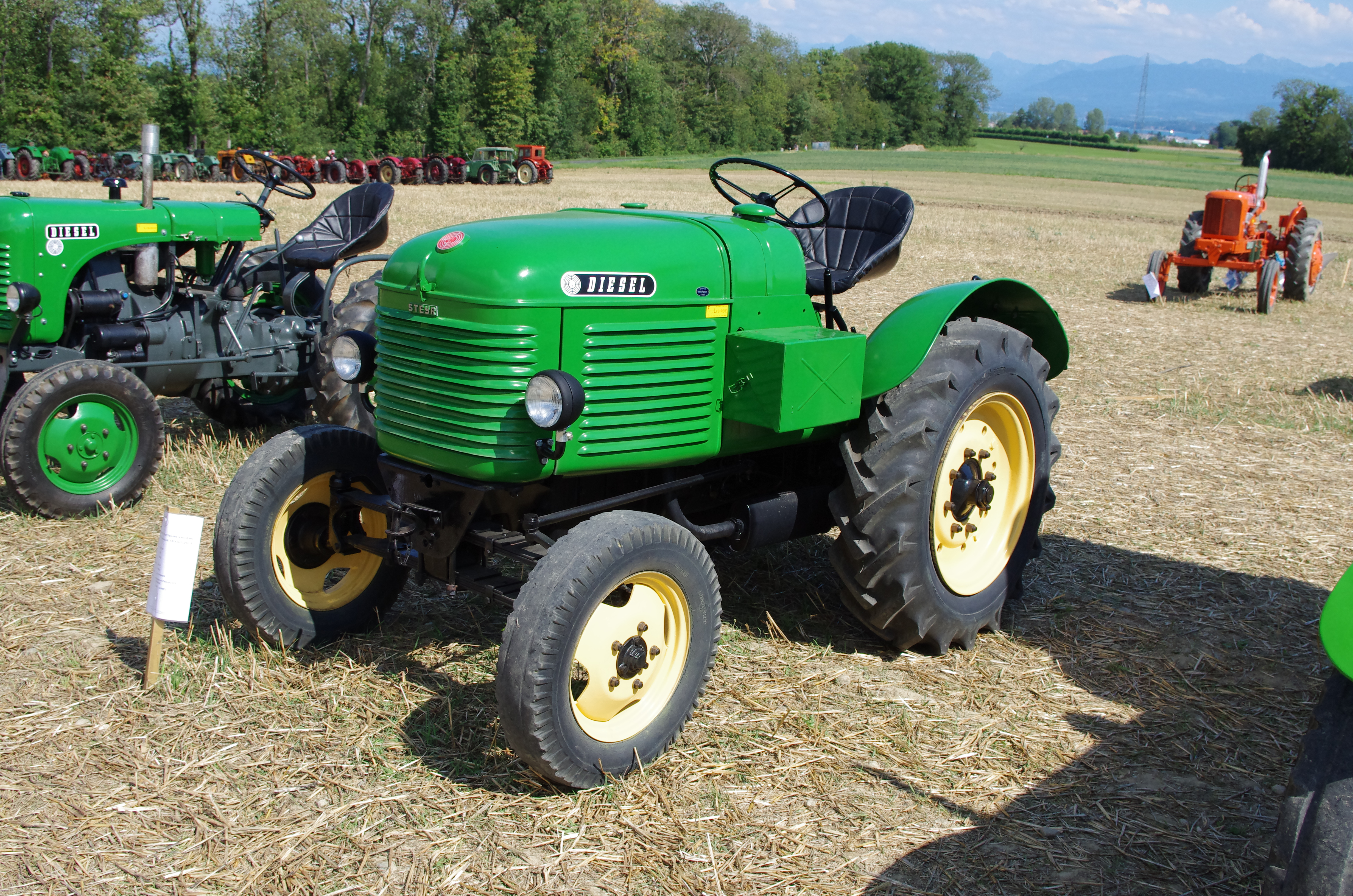 Tracteur Steyr 180 - 1952 - gauche